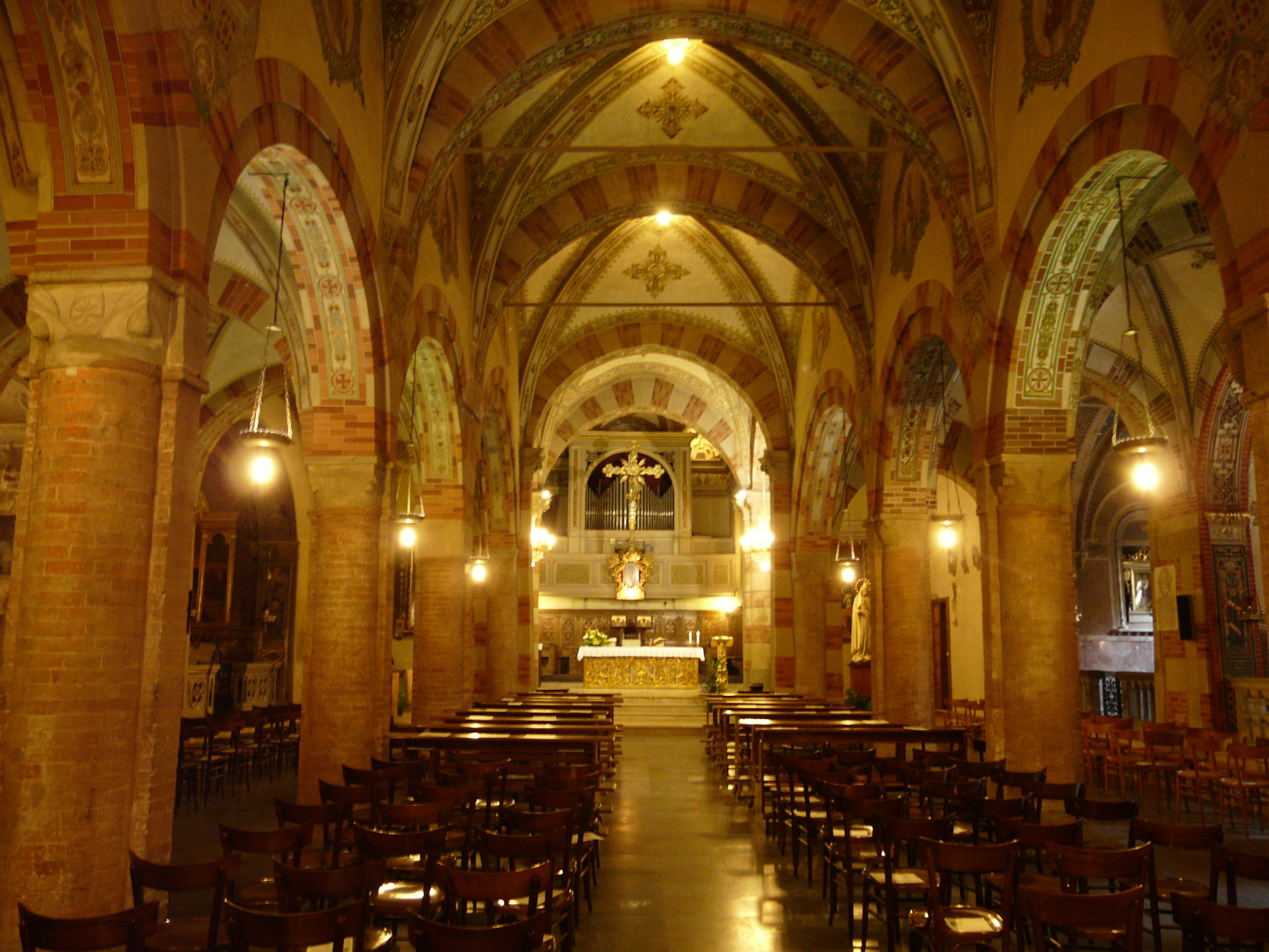 Chiesa di Santa Maria Canale, Tortona, Piemonte, Italia